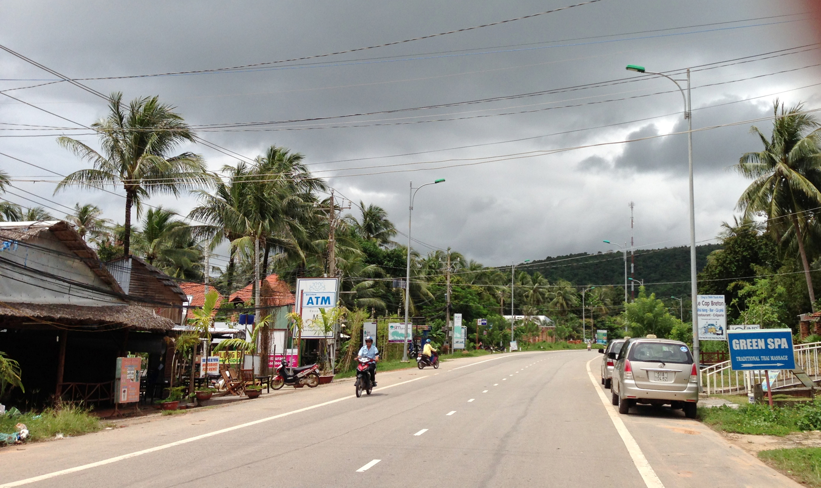 Trần hưng Đạo, dương Tơ, Cửa lắp, phú quốc, vietnam